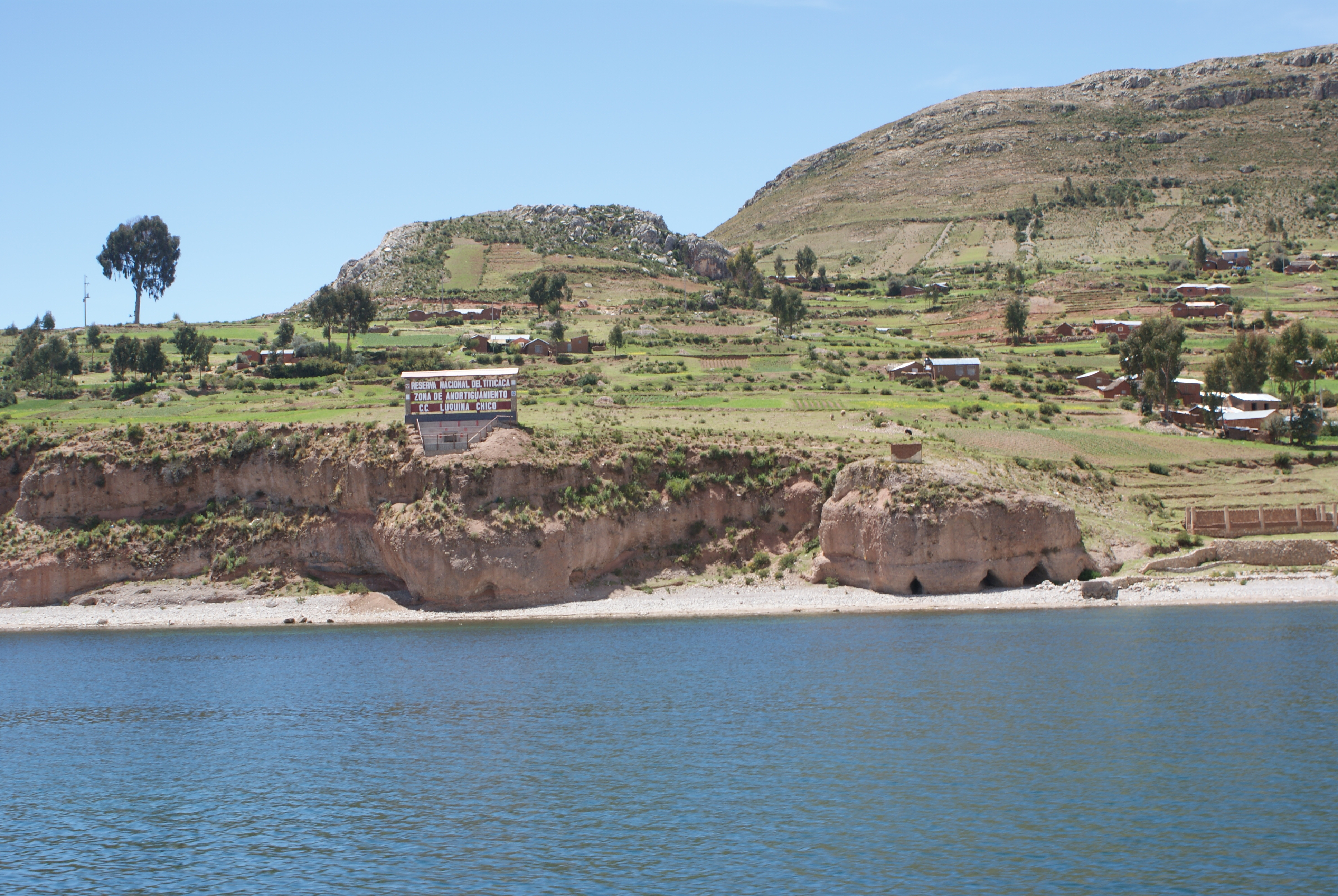 restos de la cultura aimara en puno